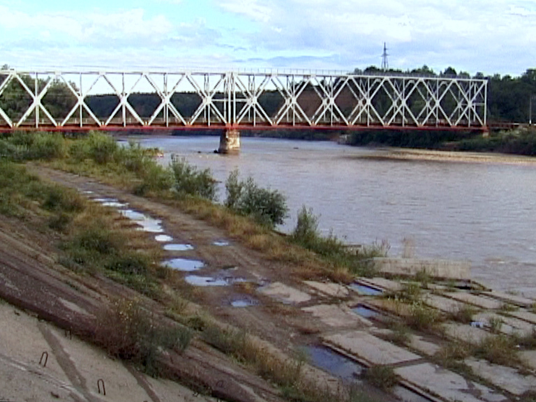 г. Белореченск. Ж.Д мост. Фото Виктора Белоусова.